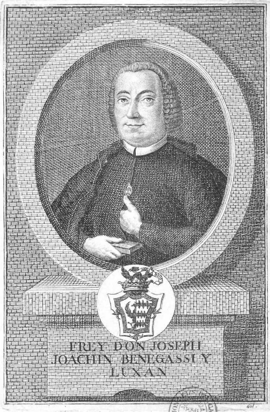 Frey Don Joseph Joachin Benegassi y Laxan. Grabado de Jerónimo Antonio Gil, ilustración de las Obras Métricas, Madrid, s. a.